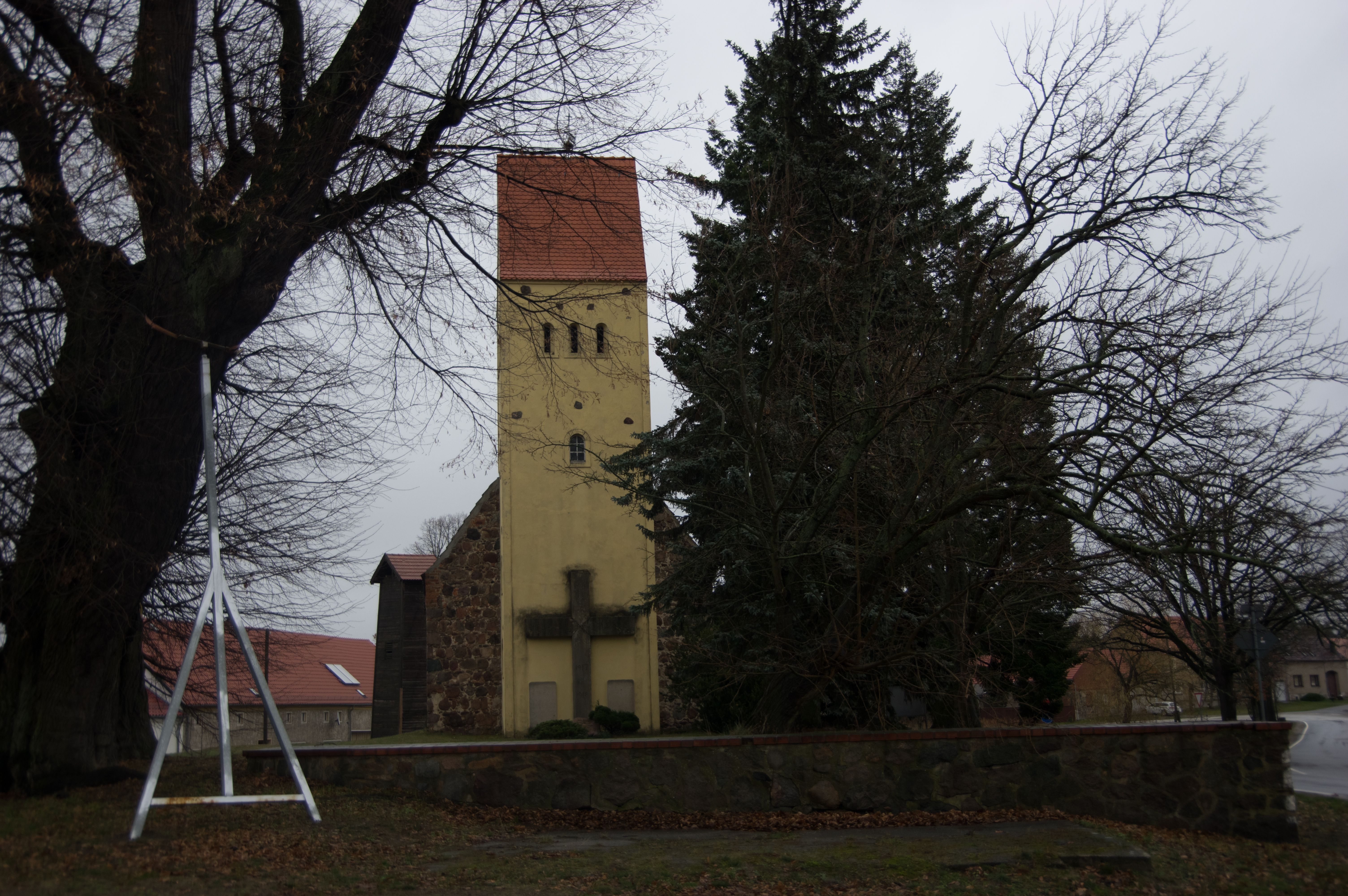 Baruth/Mark Ortsteil Merzdorf in Brandenburg. Die Kirche steht unter Denkmalschutz.